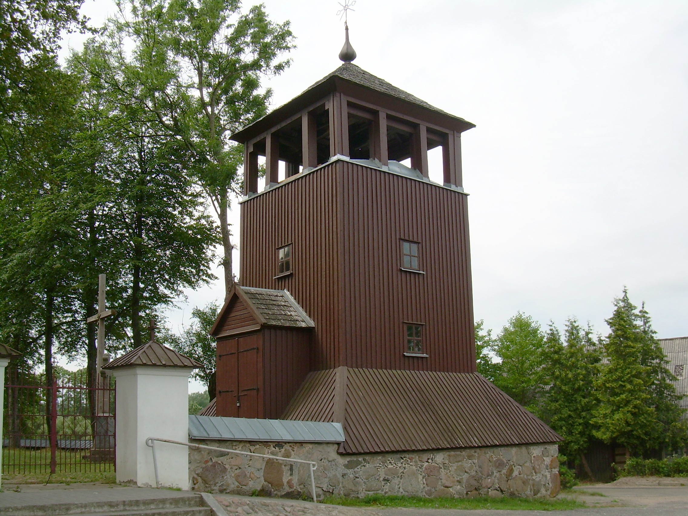 Platelių Šv. apaštalų Petro ir Pauliaus bažnyčia